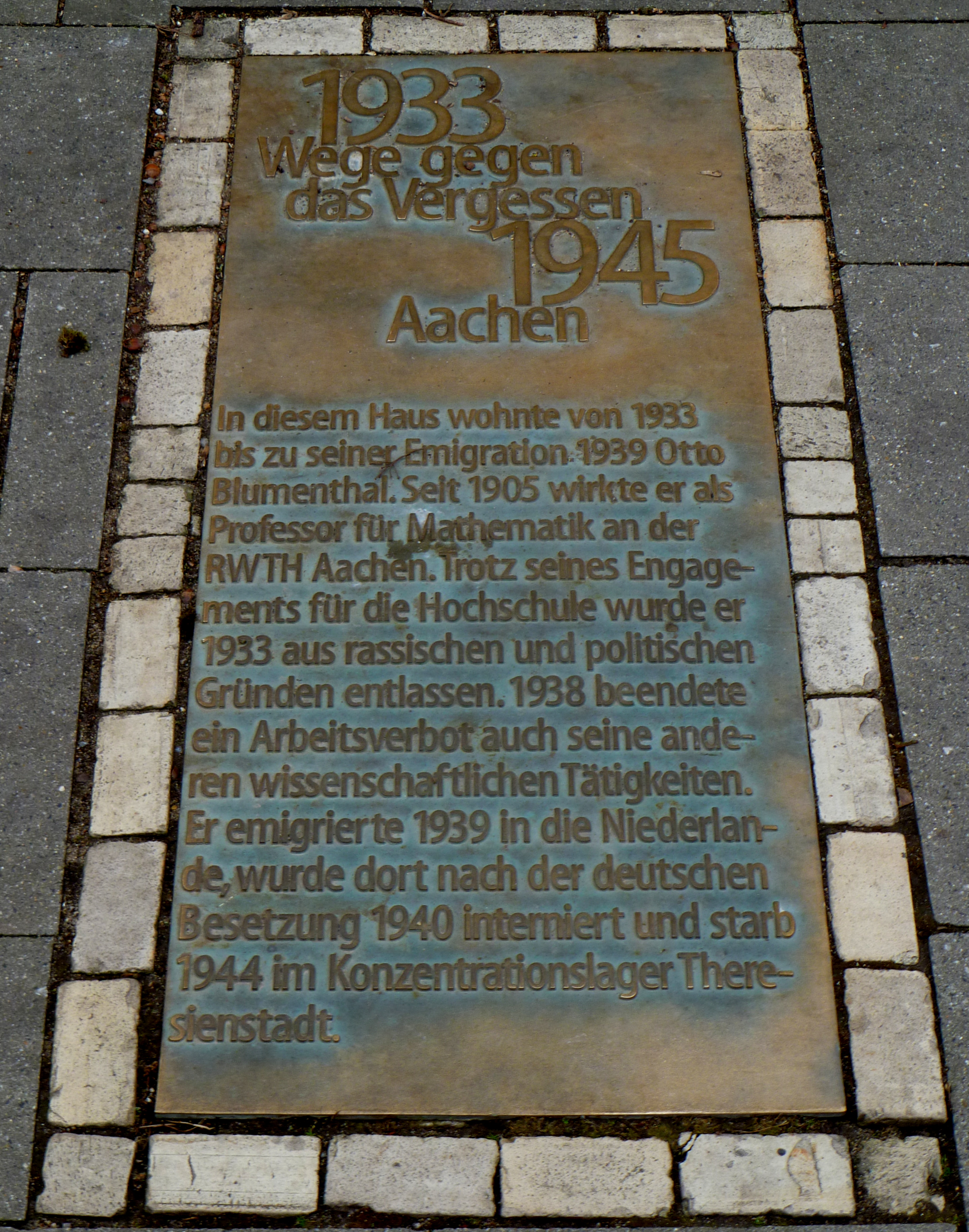 Gedenktafel im Rahmen "Wege gegen das Vergessen" für Otto Blumenthal in der Limburger Straße 22 in Aachen